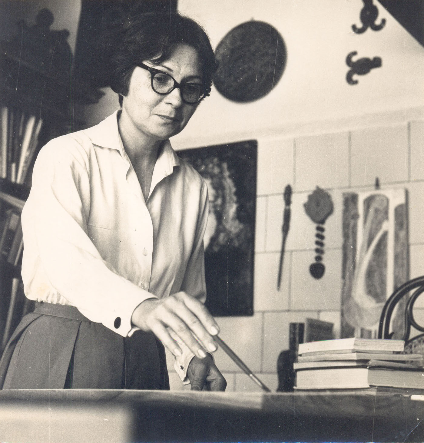 Fotografía del año 1960, digitalizada por mí del álbum personal de la artista Lotte Schulz con motivo de la realización de un trabajo bibliográfico sobre la misma